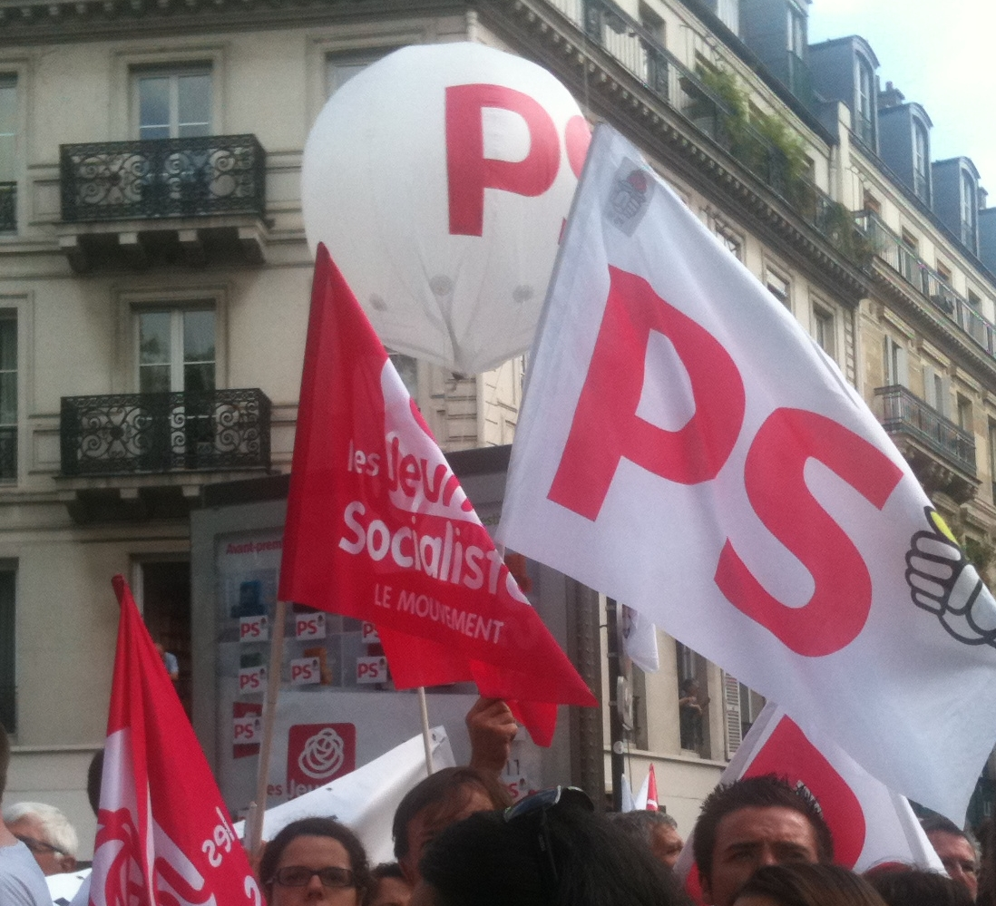 Drapeaux du PS à la manifestation contre la réforme Woerth des retraites.